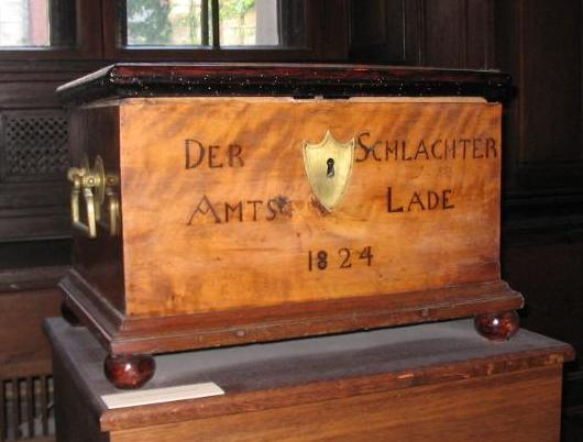 Zunftlade Schlachter, Märkisches Museum Berlin Selbst fotografiert, Mai 2004 GNU FDL